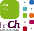 logo depuis 2013 du département agronomique de la haute Ecole Charlemagne à Huy, Belgique